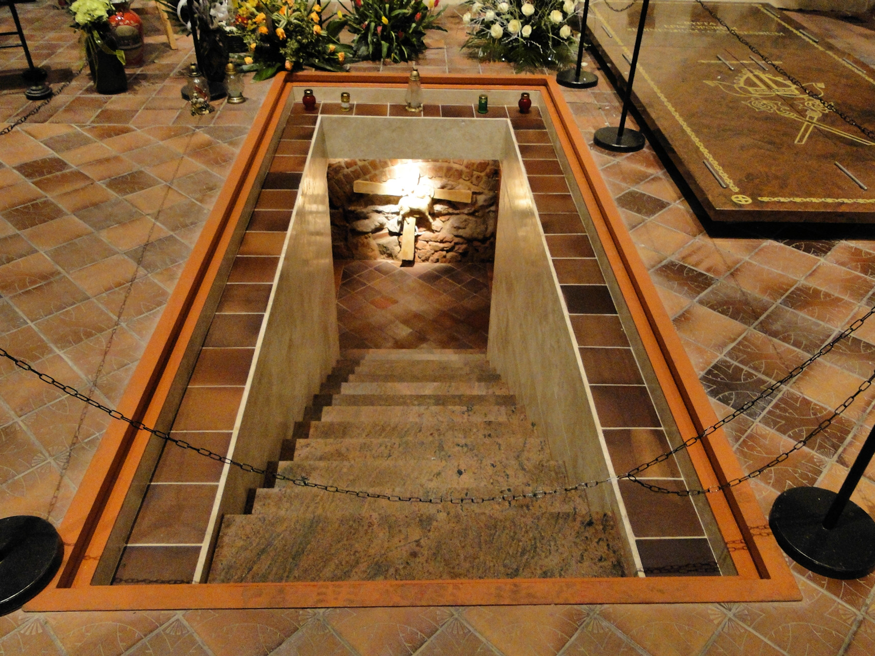 Wejście do nowej krypty w szczecińskiej katedrze św. Jakuba.